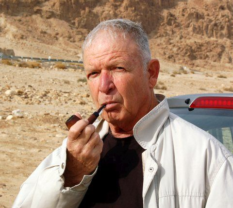 הבמאי יהודה קווה